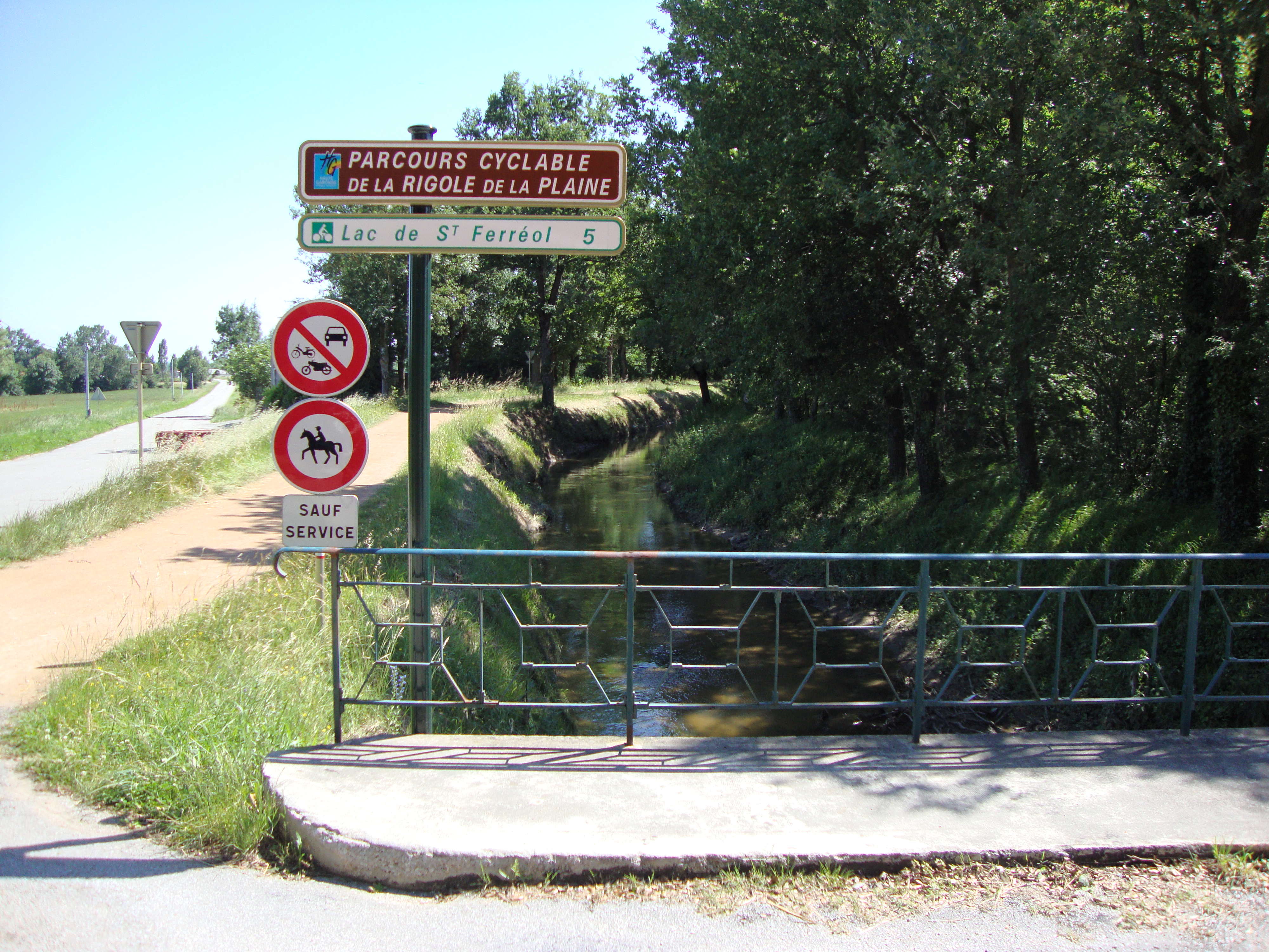 Saint-Félix-Lauragais (Haute-Garonne, Midi-Pyrénées, France) : Rigole de la Plaine.